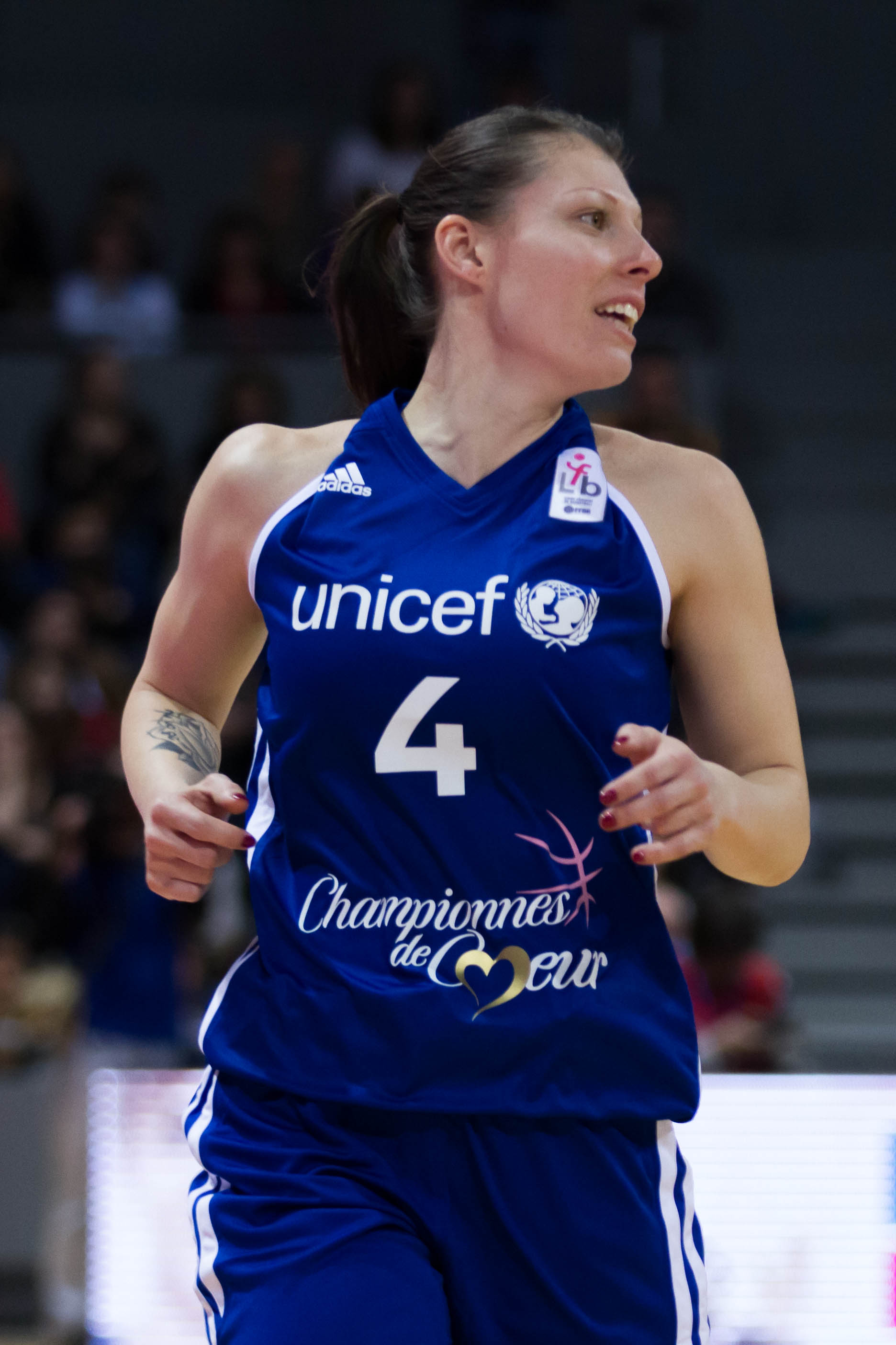 Anaël Lardy, match de gala championnes de cœur